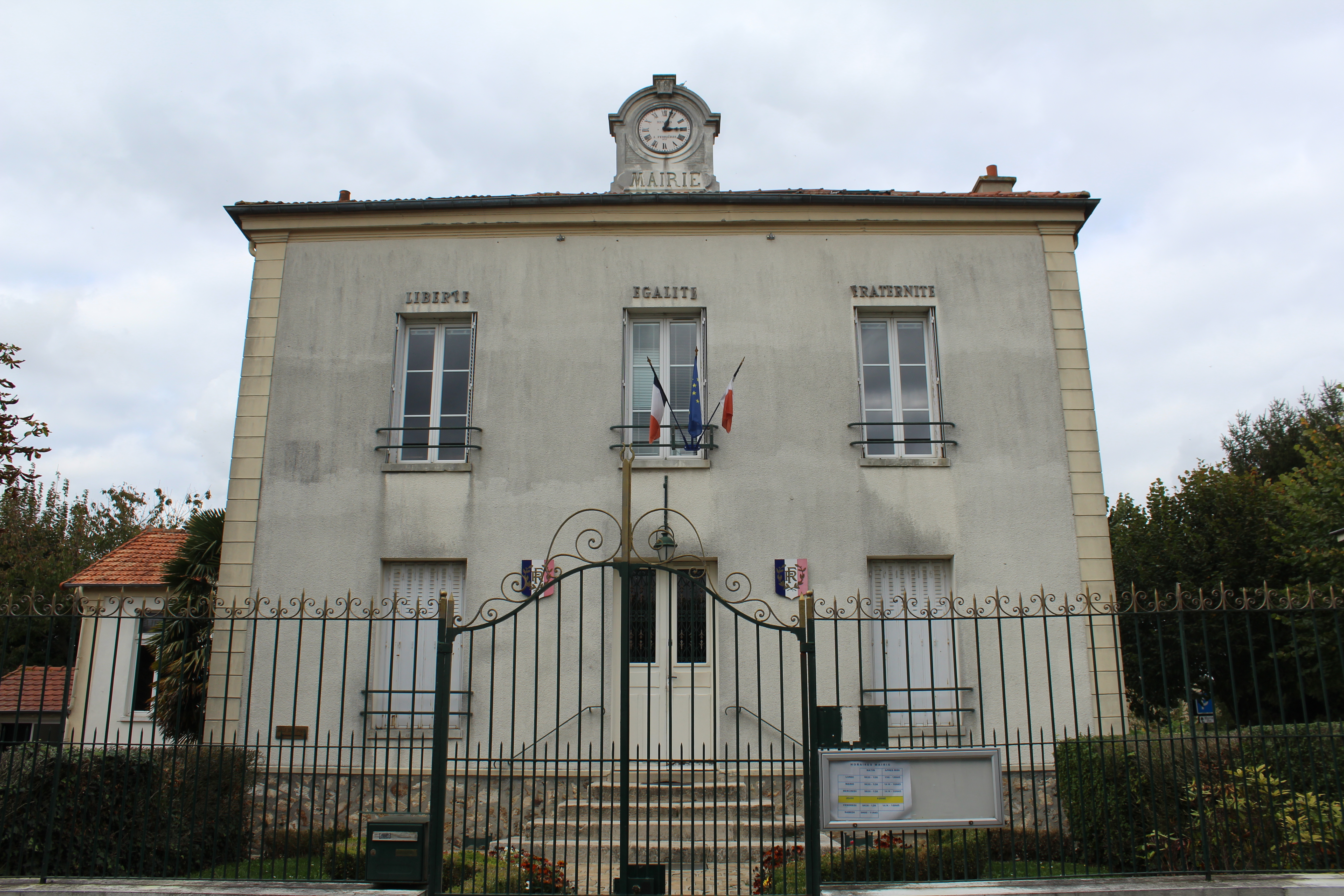 Mairie de Chanteloup-en-Brie.